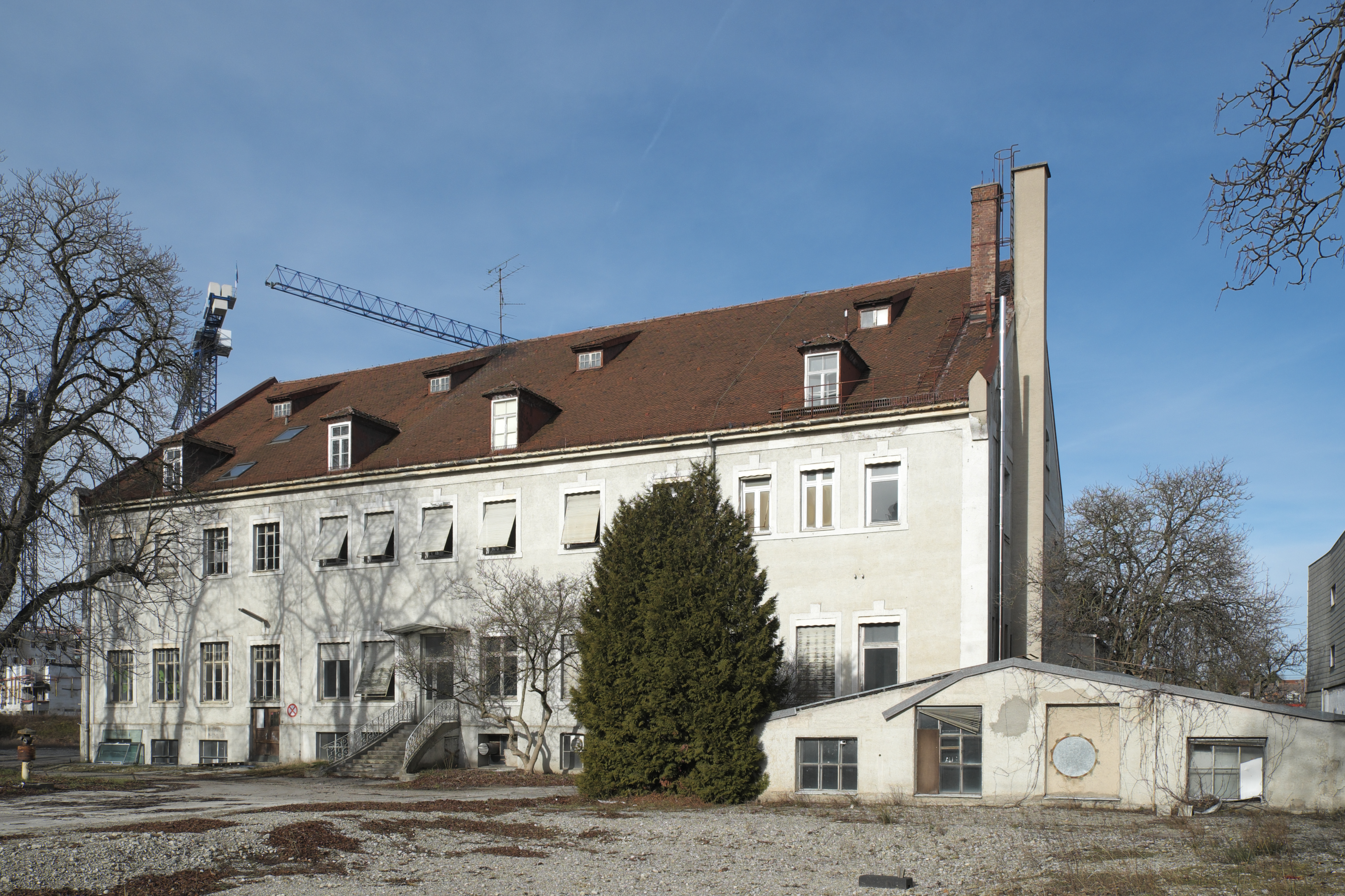 Ehemalige Kuvertfabrik in der Landsberger Straße 444-446 in Pasing im Stadtbezirk Pasing-Obermenzing in München (Bayern/Deutschland)